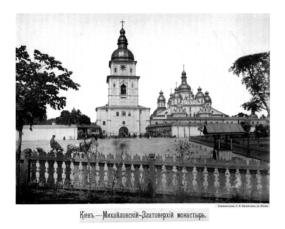 Київ. Михайлівський Золотоверхий собор Kyiv. St. Michael's Golden-Domed Cathedral Kyiv. Cathédrale Saint-Michel-au-Dôme-d'Or